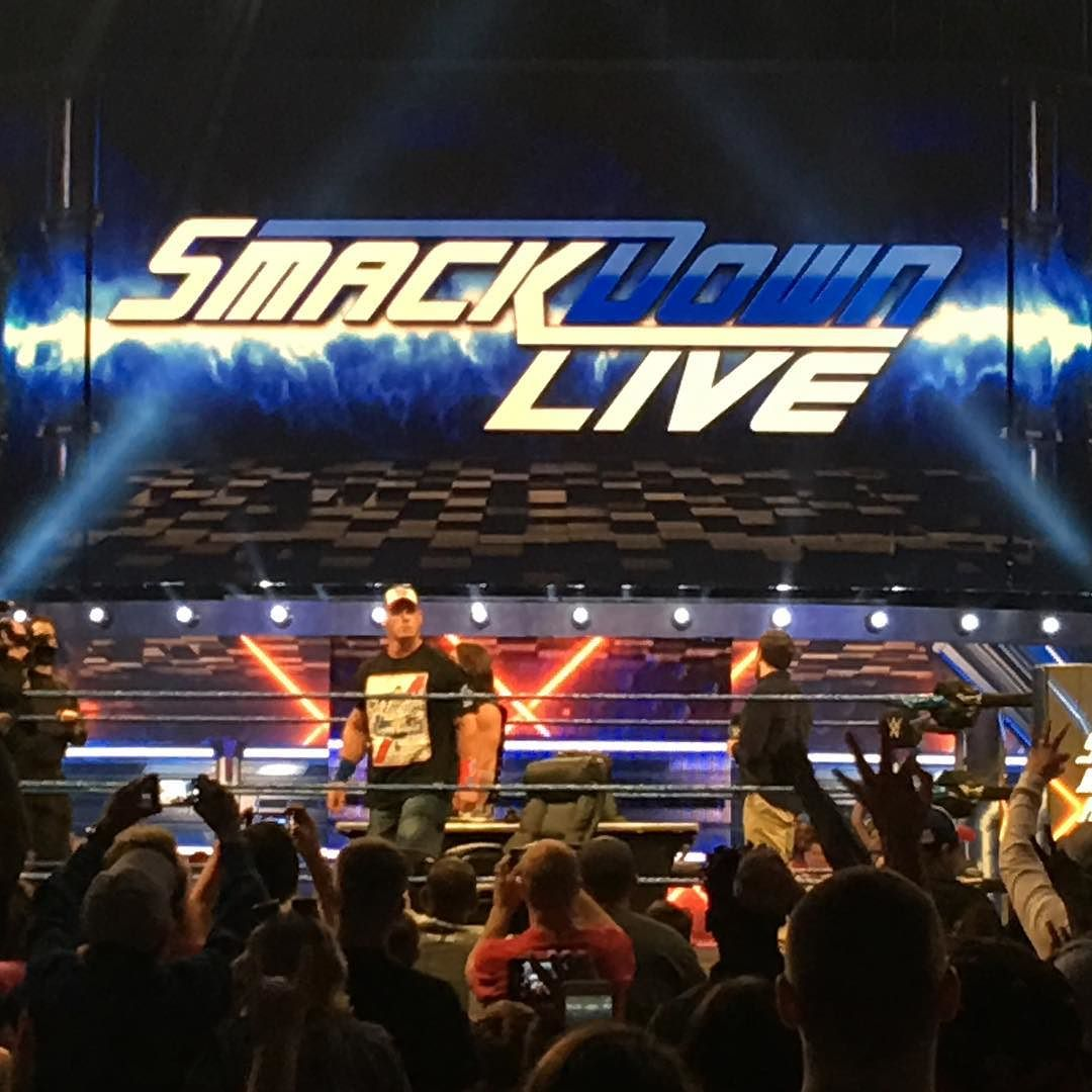 via Instagram ift.tt/2hQxcdj